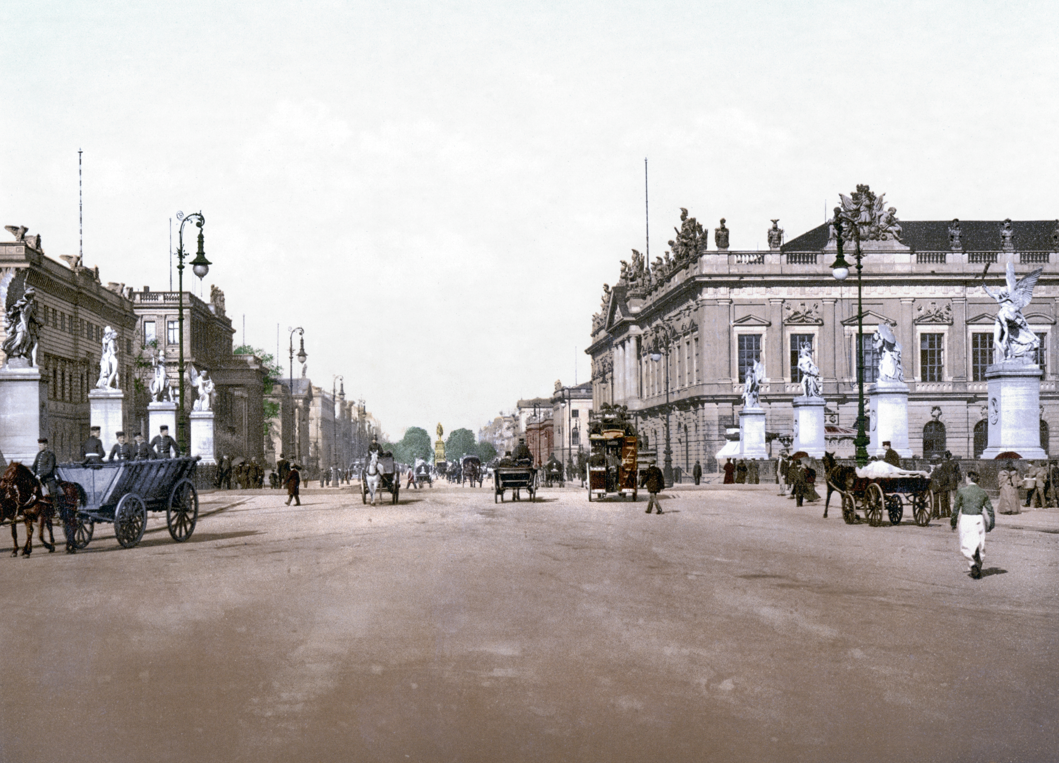 Berlin, Unter den Linden, Blick von der Schlossbrücke zwischen 1890 und 1900